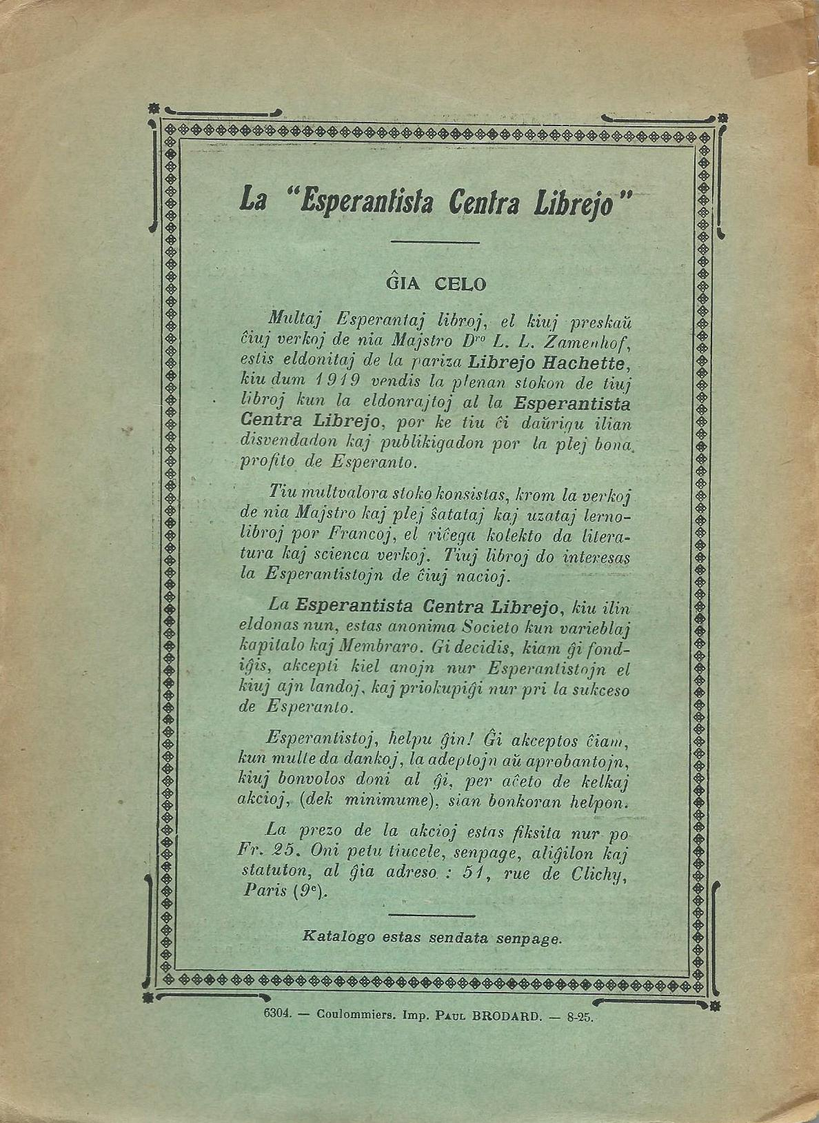 kovrilo de "Proverbaro Esperanta", 1925